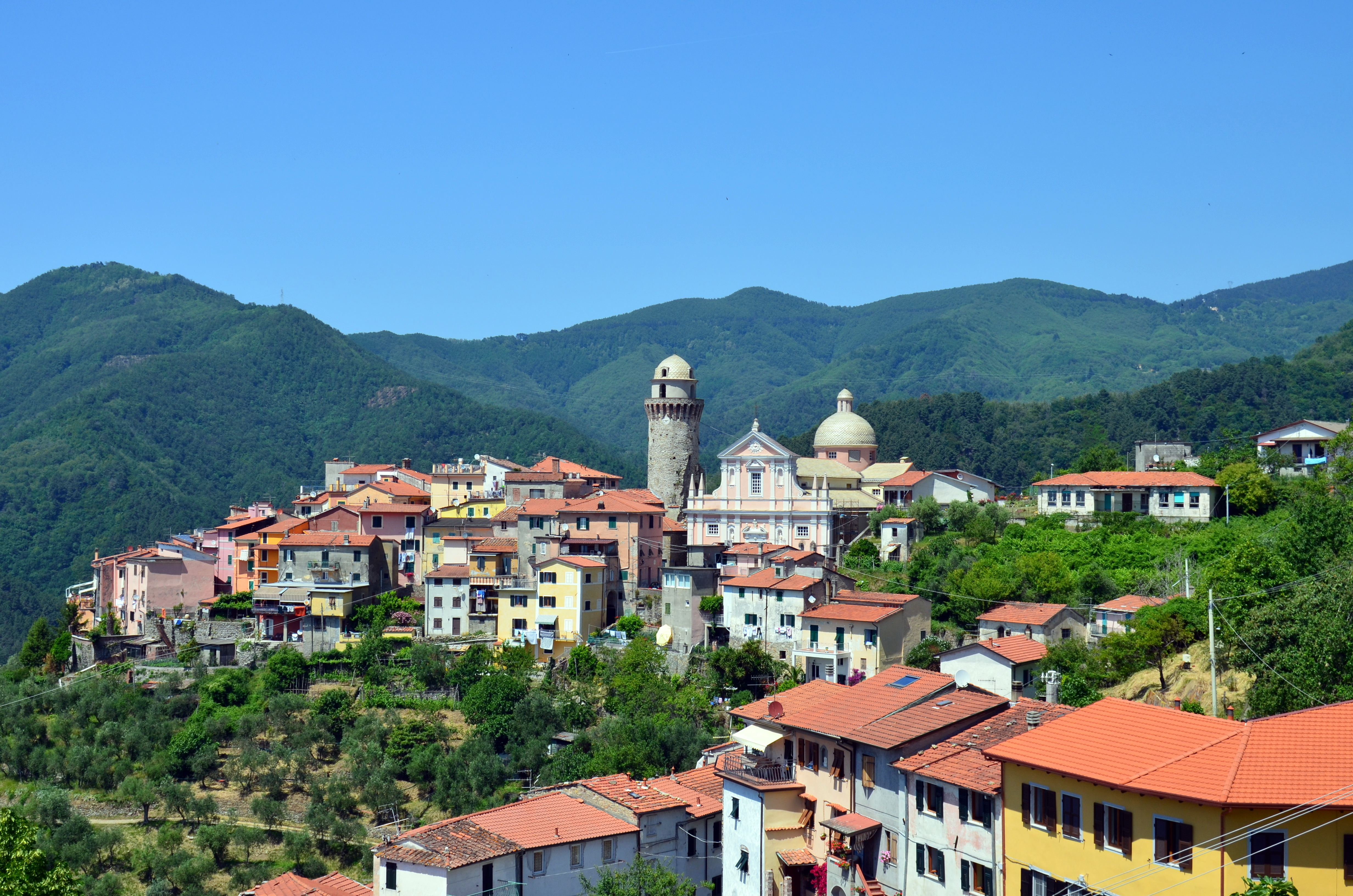 Panorama di Ortonovo, Liguria, Italia